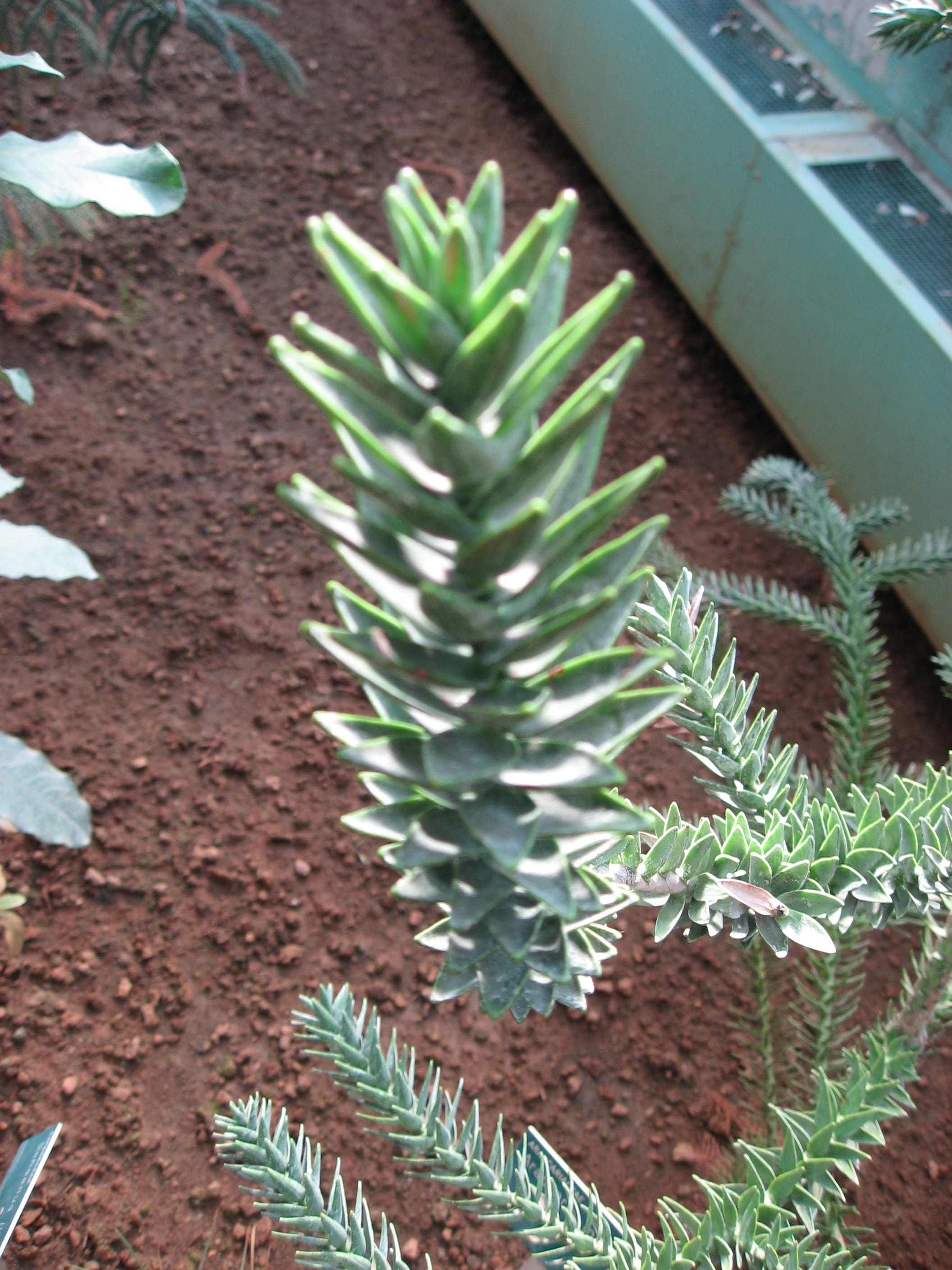 Araucaria montana in Serres d'Auteuil Map: 48° 50' 49" N 2° 15' 8" E